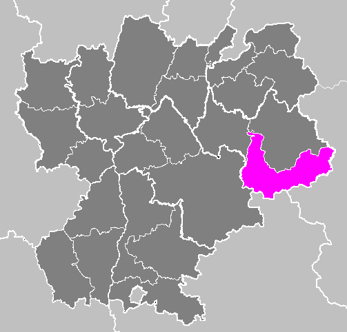 Maps of arrondissements and cantons of France: Arrondissement de Saint-Jean-de-Maurienne.PNG (Région Rhône-Alpes)